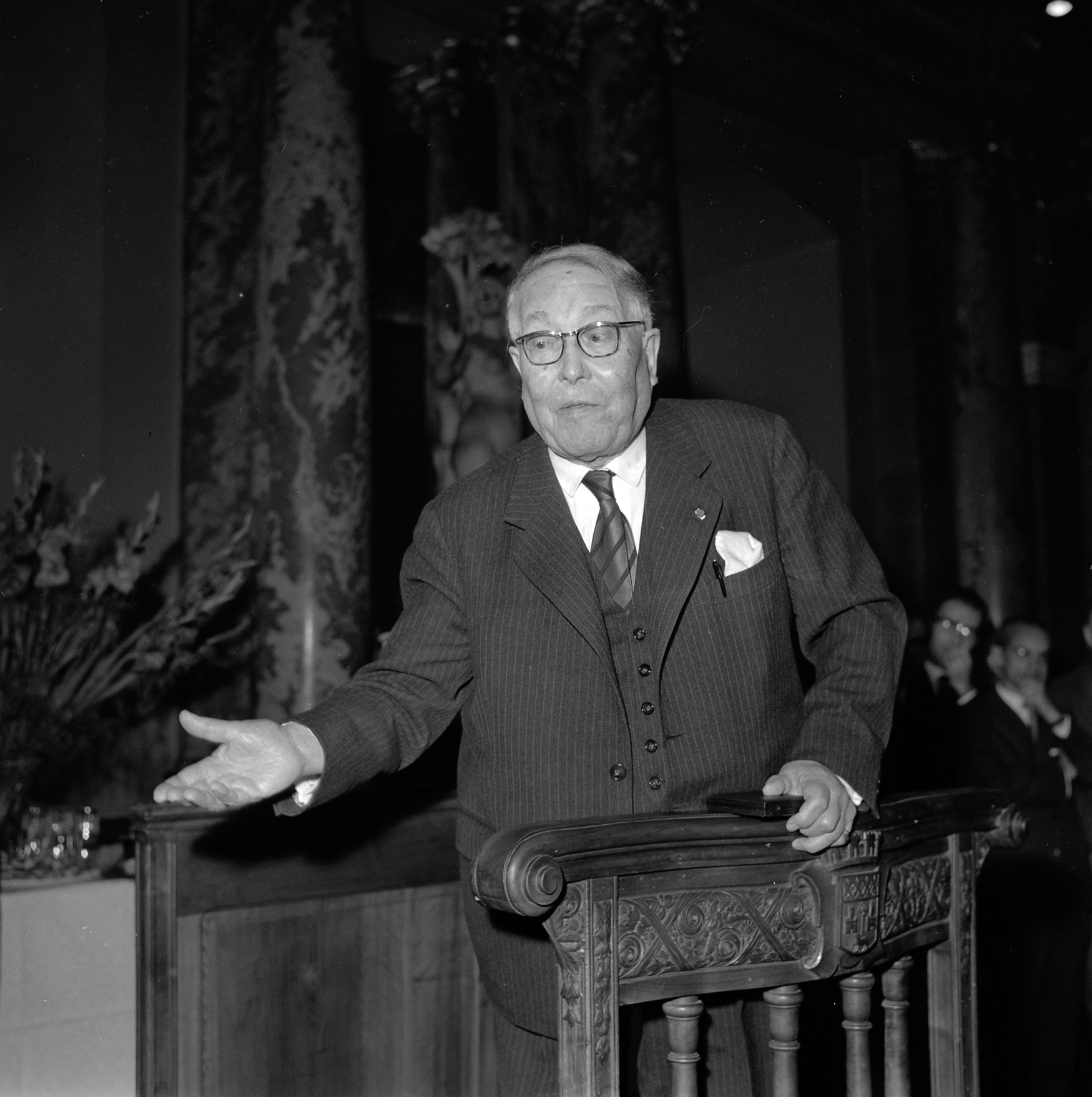 intérieur du Capitole. Le 6 Novembre 1962, Vue du compositeur Henri Busser en plein discours dans la salle du Capitole.